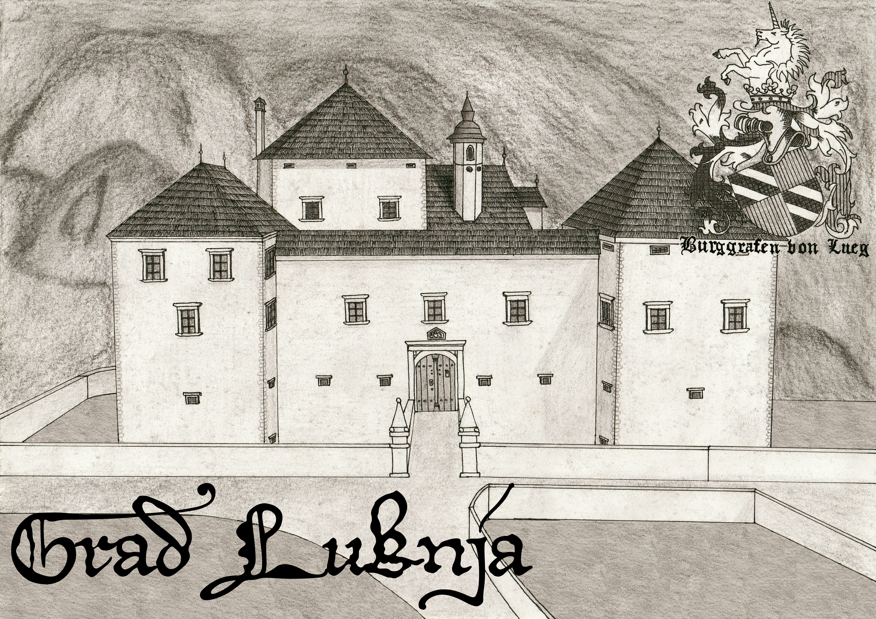 Poskus rekonstrukcije gradu Luknja v Prečni pri Novem mestu iz obdobja 20. stol. Delano s pomočjo skicne osnove doc. dr. Igorja Sapača in tlorisa gradu